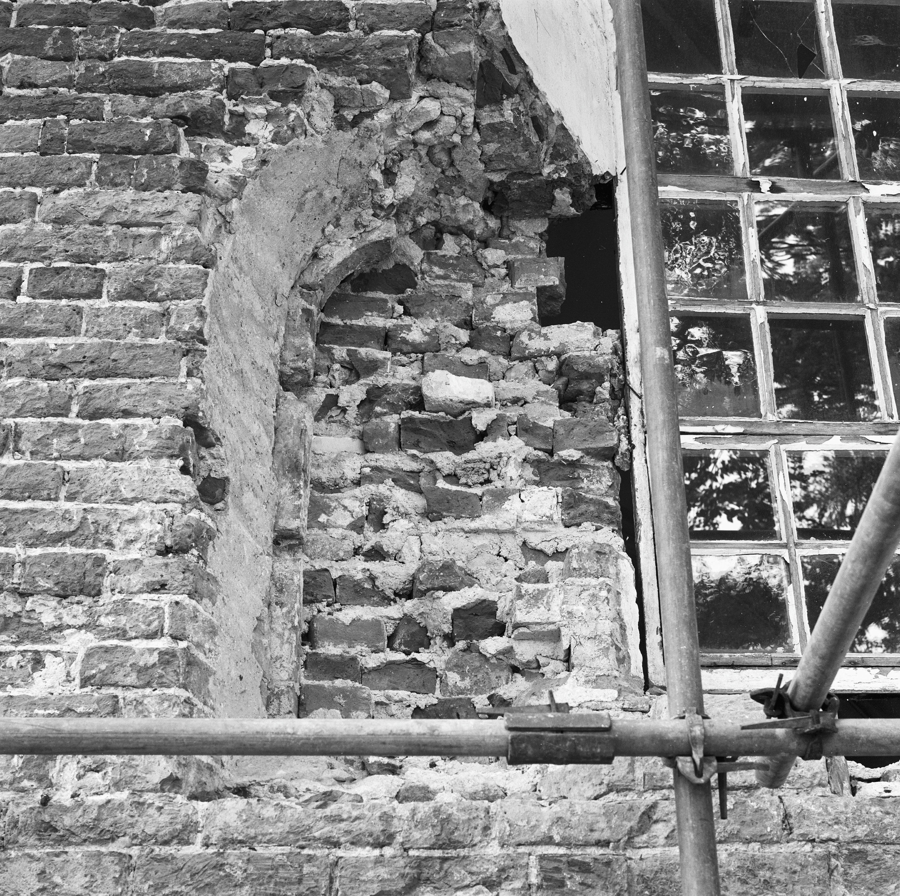 Nederlands Hervormde Kerk: oostzijde koor een van de drie romaanse venstertjes